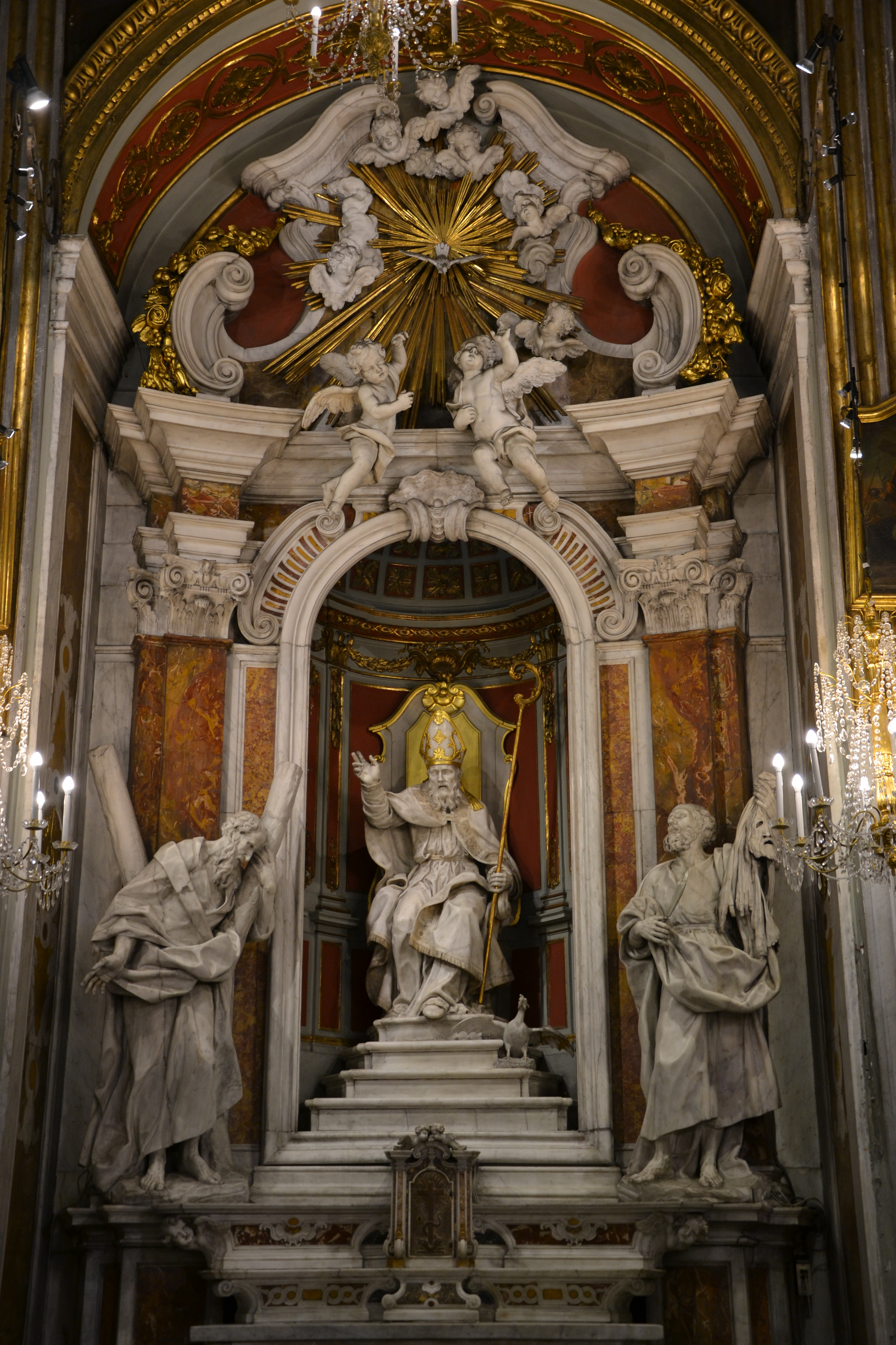 Altare di S.Siro, costruito nel 1734 e in seguito arricchito con tre sculture (1771) di Pasquale Bocciardo: Sant’Andrea, a sinistra, San Siro, al centro e San Bartolomeo a destra, Chiesa di San Siro di Nervi